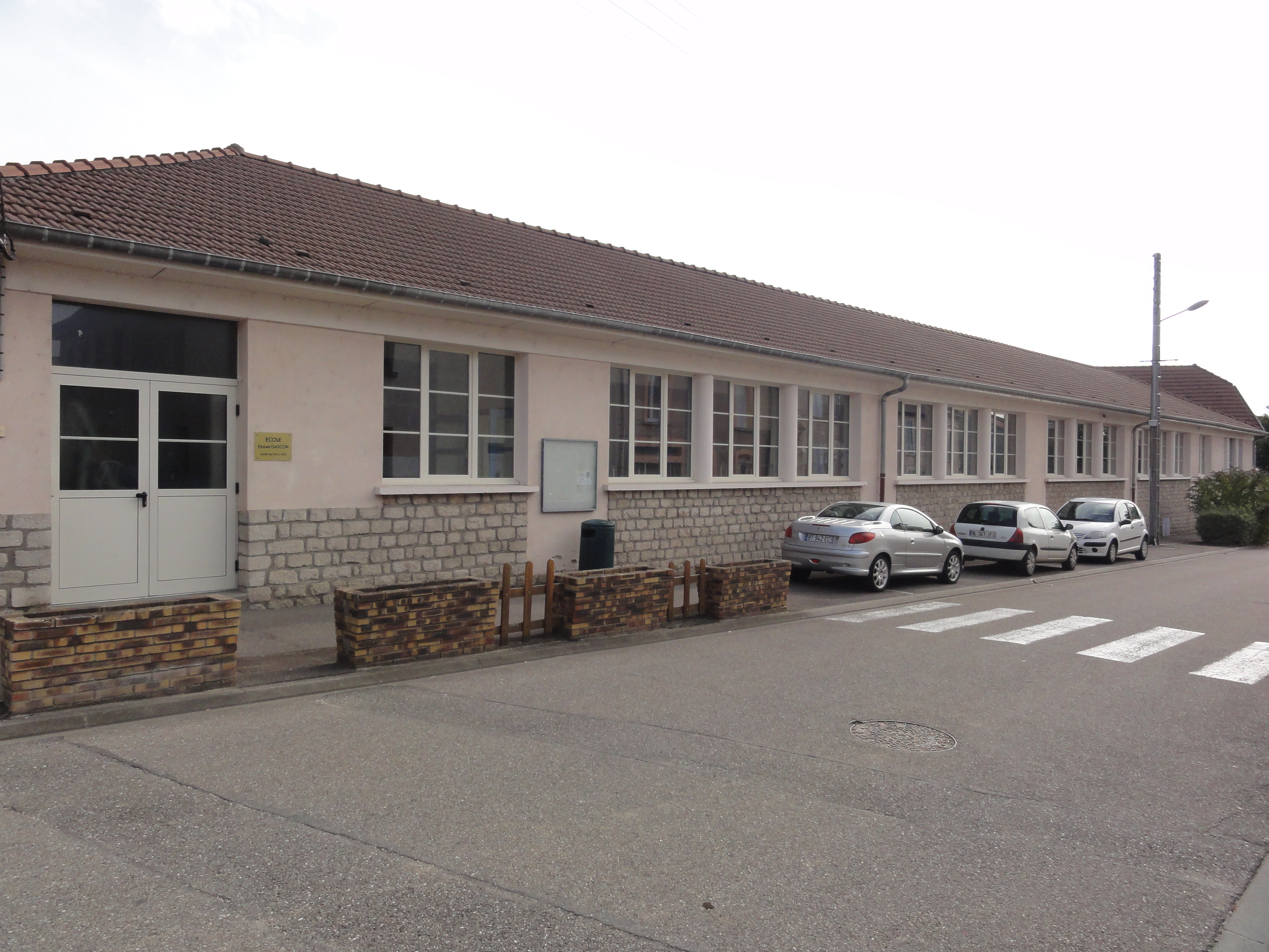 Haudainville (Meuse) école Edgar Gascon